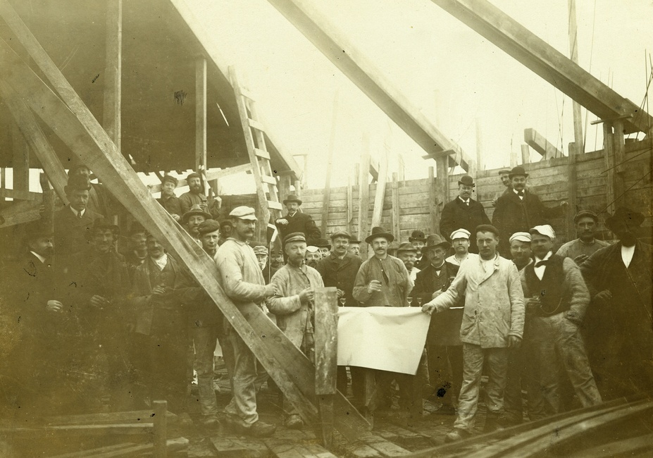 Rejsegilde på Gentoftes vandtårn. Billedet er fra Lokalhistorisk Arkiv for Gentofte Kommune på danskebilleder.dk.